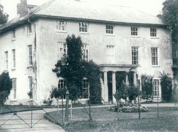 Llanrumney Hall, Cardiff in 1891